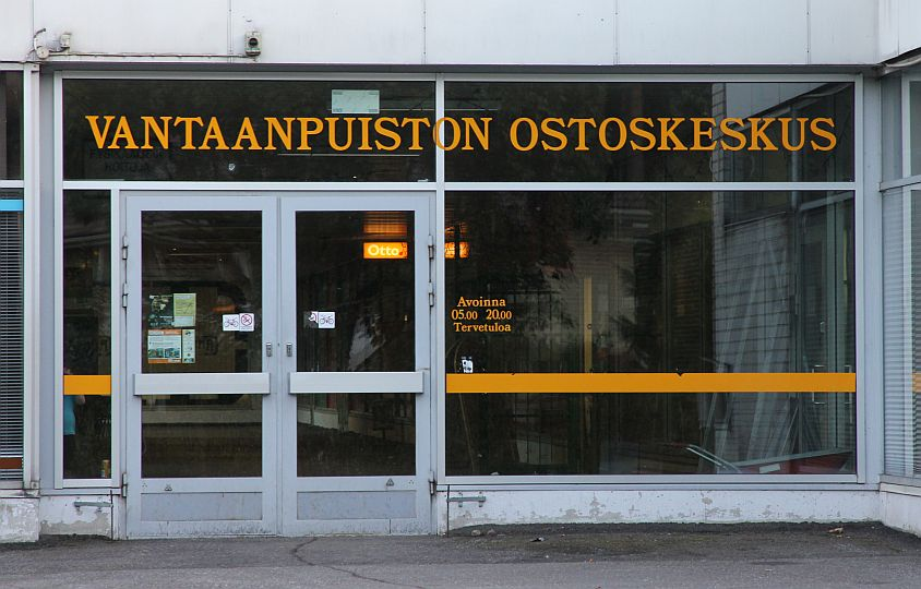 Eräs Vantaanpuiston ostoskeskuksen sisäänkäynti Vantaalla. Huom: Muista säilyttää viittaus kuvaajaan, mikäli käytät kuvaa.